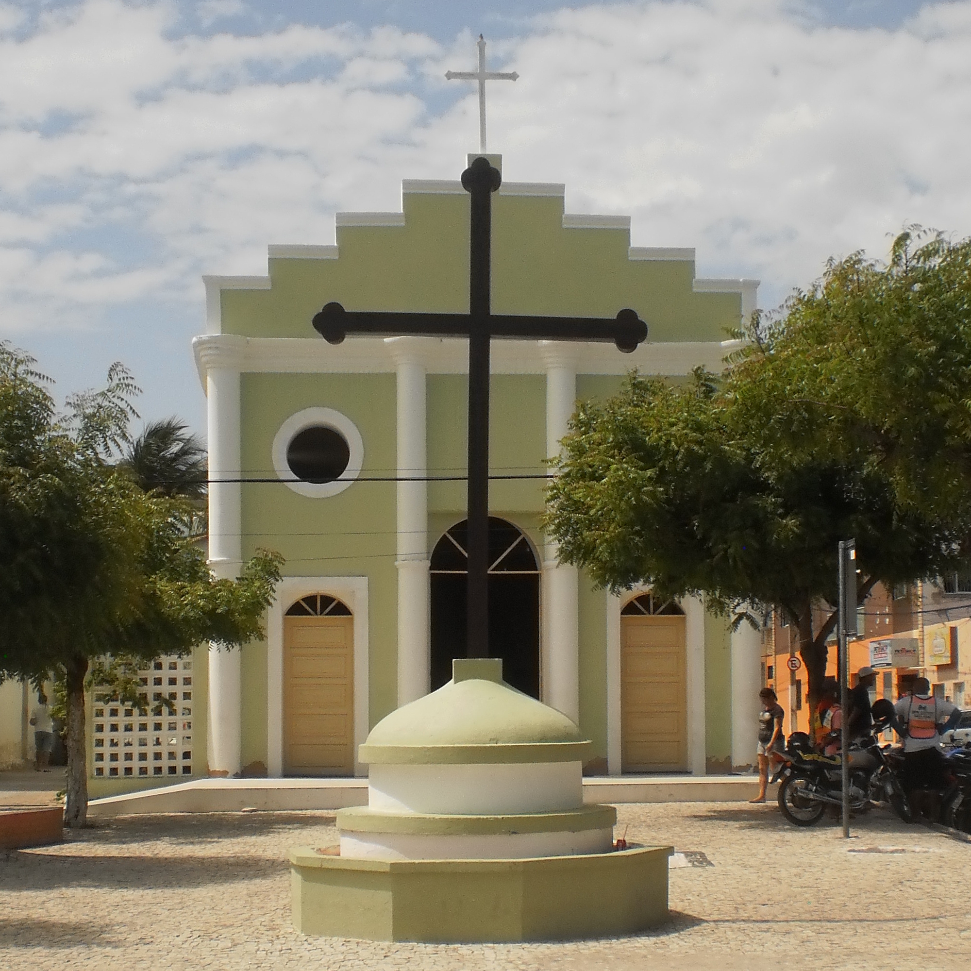 Igreja Matriz de Nossa Senhora da Soledade, da diocese de Limoeiro do Norte, em Icapuí, Ceará (Brasil)